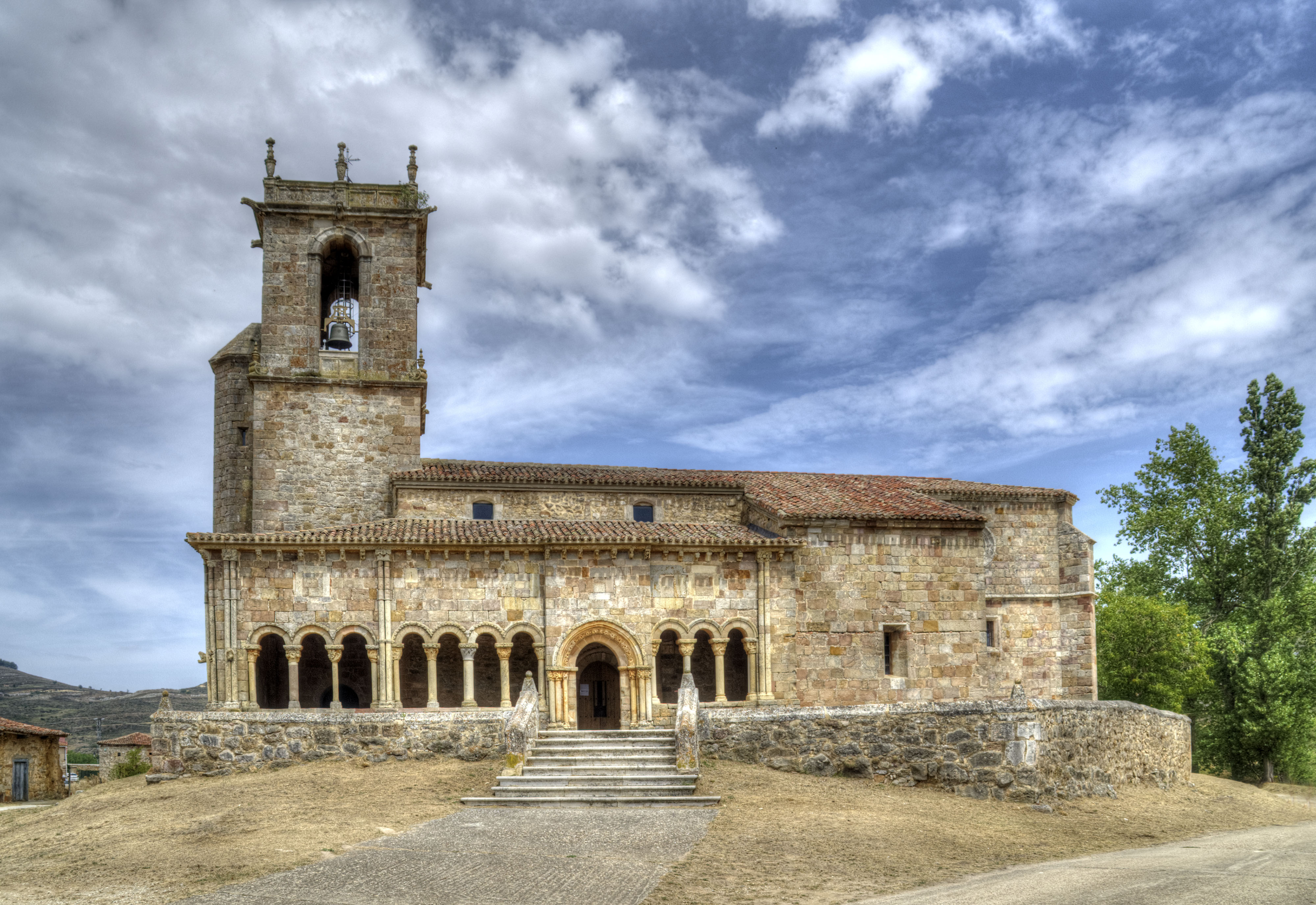 Iglesia ubicada en Rebolledo de la Torre, en la provincia de Burgos, destacable especialmente por su galería porticada. Fue construida a finales del siglo XII aunque en el XVI se reconstruyó parcialmente, conservando elementos románicos como la citada galería, una portada y una ventana profusamente tallada.